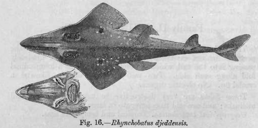 Rhynchobatus djeddensis = Rhynchobatus djiddensis (Forsskål, 1775)